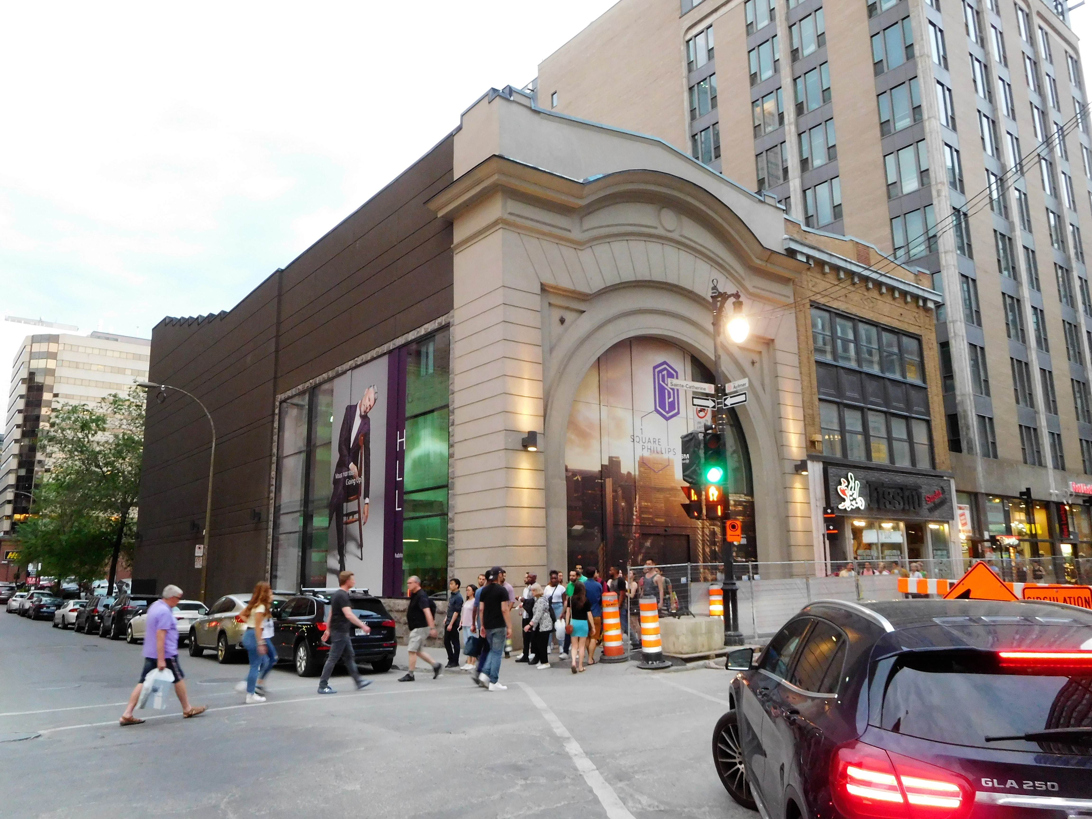 Le Gaiety Theatre (autres noms: The Ciné, London, Holman), 539, rue Sainte-Catherine Ouest, Montréal